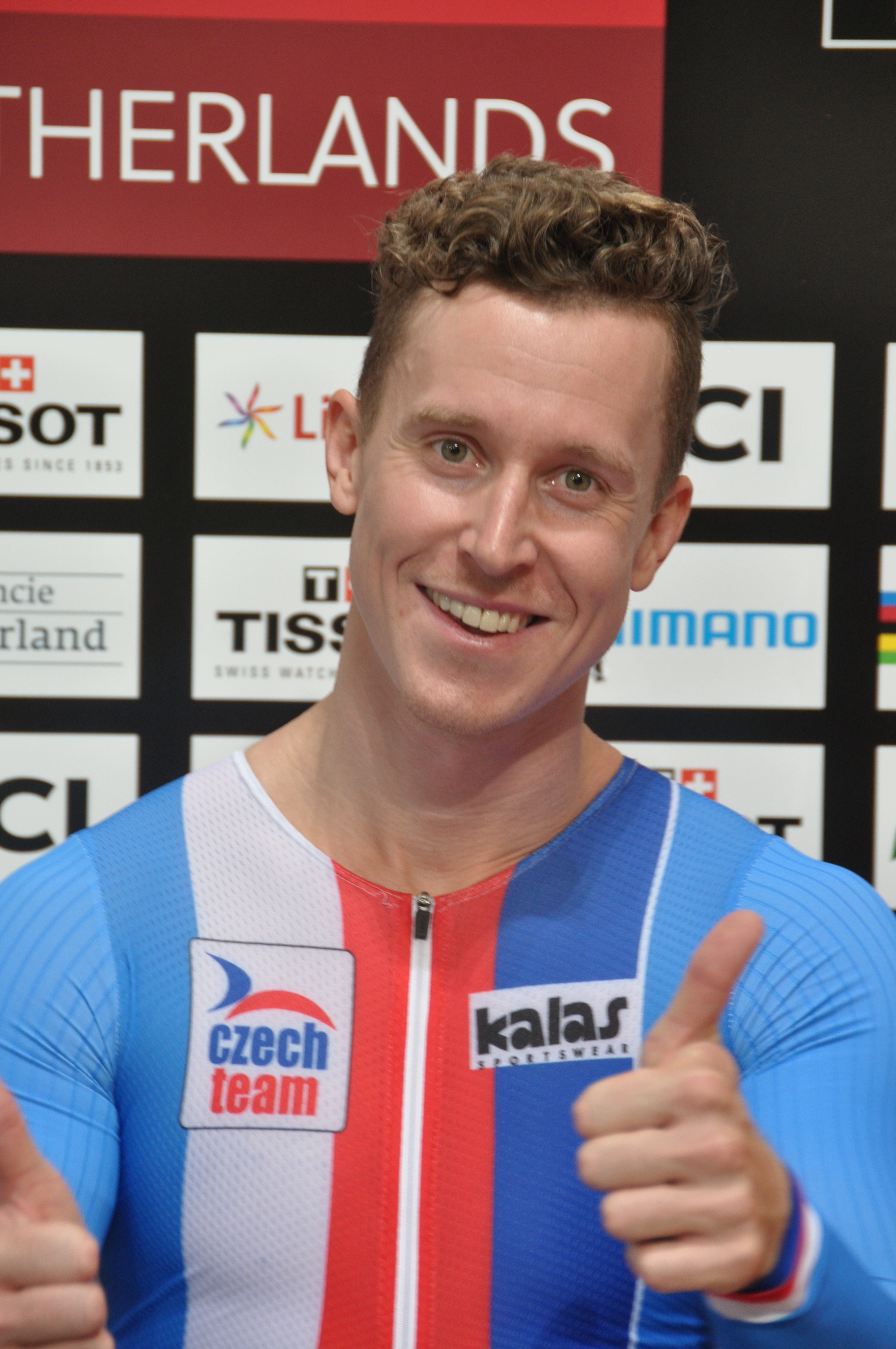 Tomáš Bábek, tschechischer Radsportler